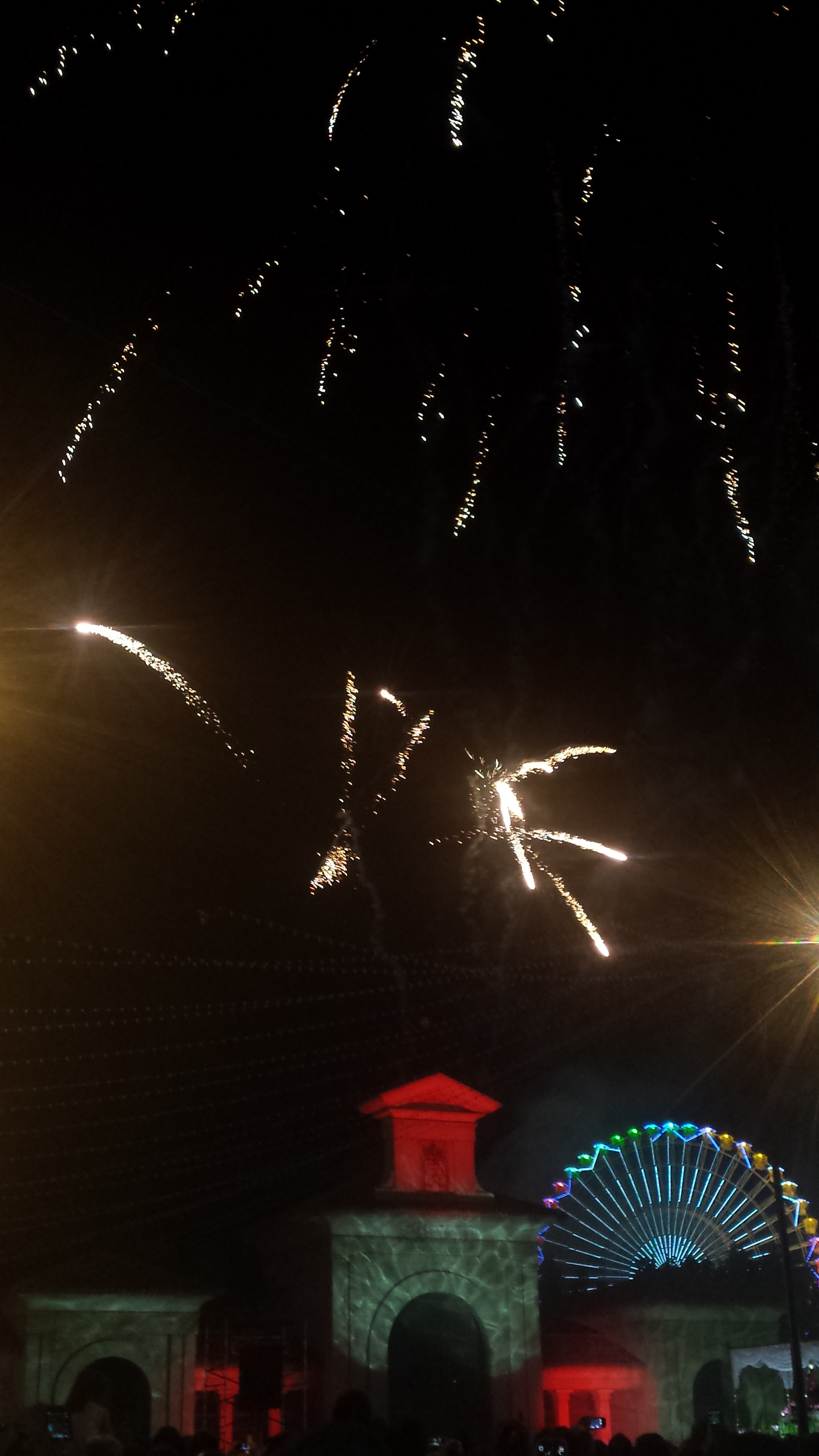 Fuegos artificales. Feria de Albacete 2014